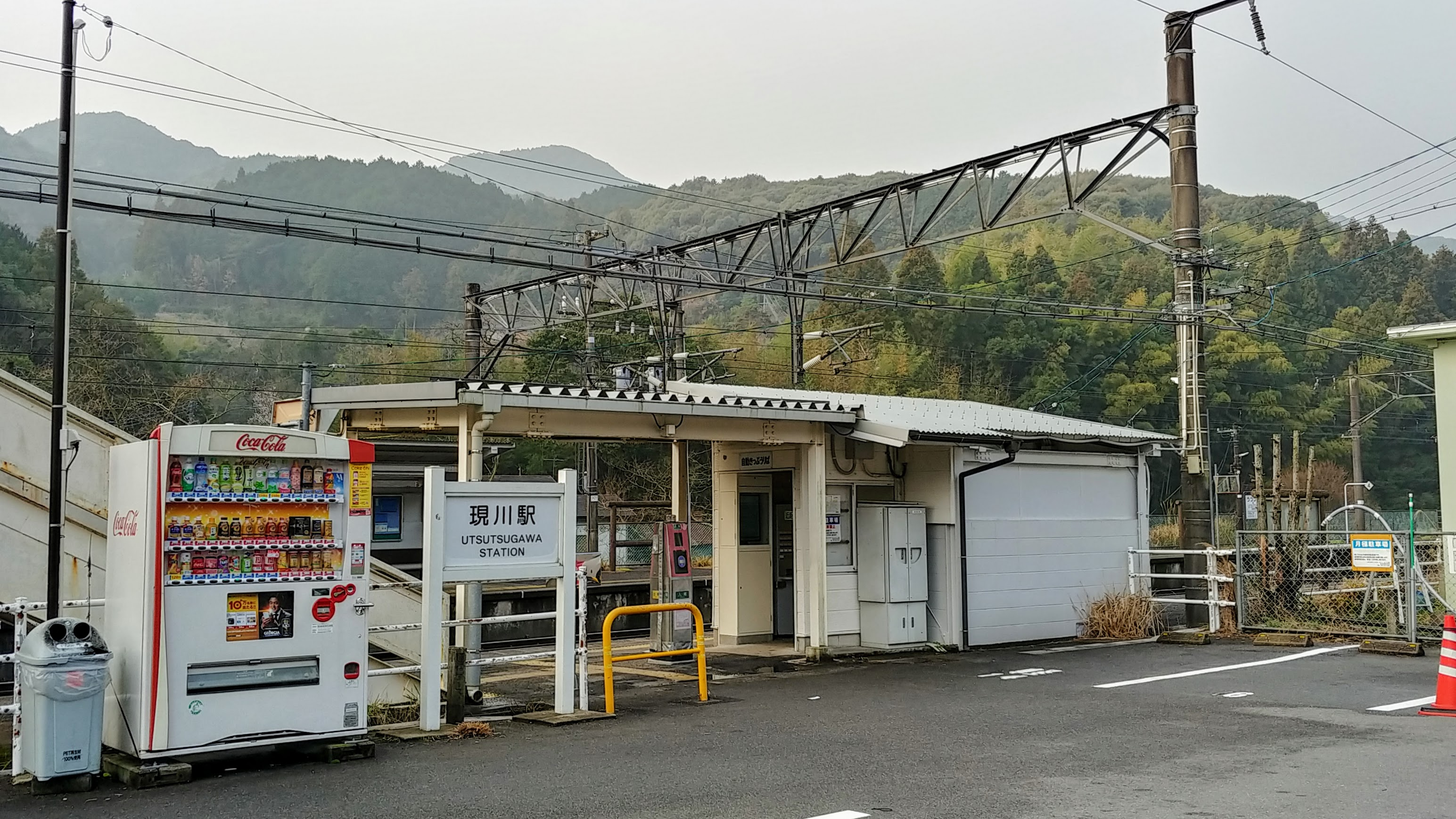 現川駅 長崎本線